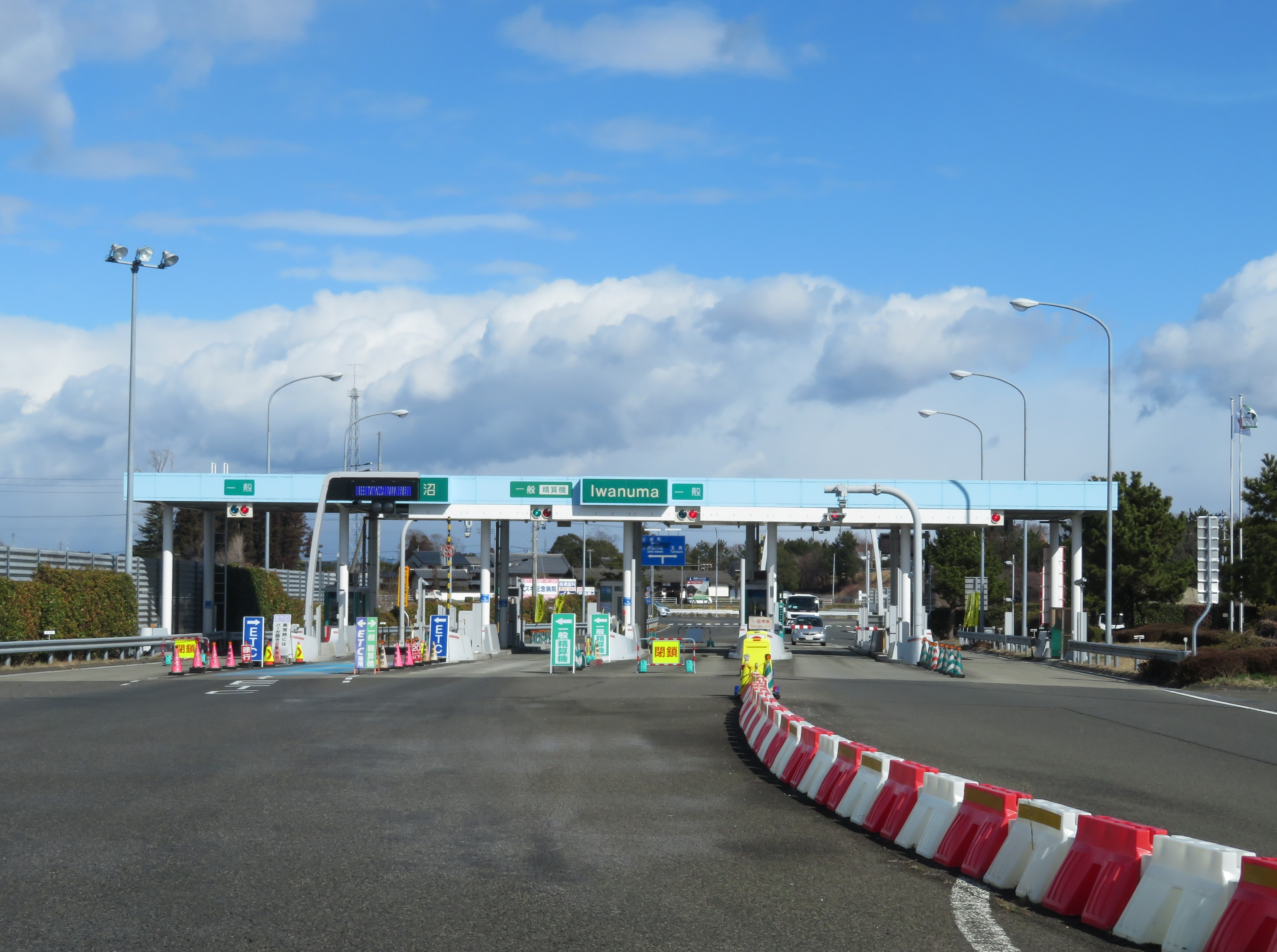 仙台東部道路岩沼ＩＣ料金所付近 Canon PowerShot SX720 HS